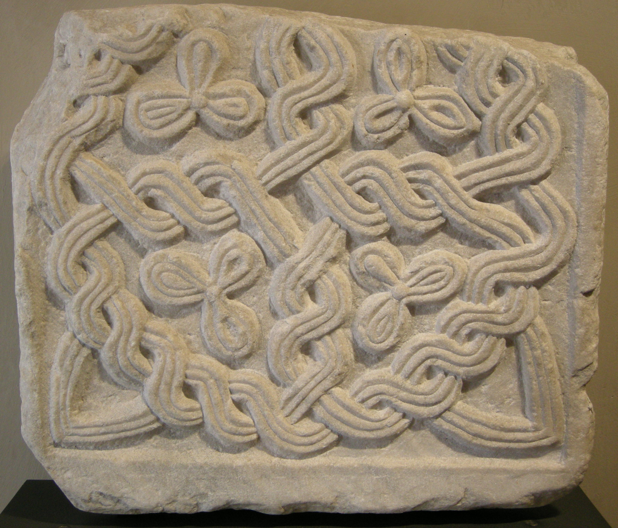 Arte longobarda, frammento di lastra, 750-800 ca. Museo Civico (Turin).